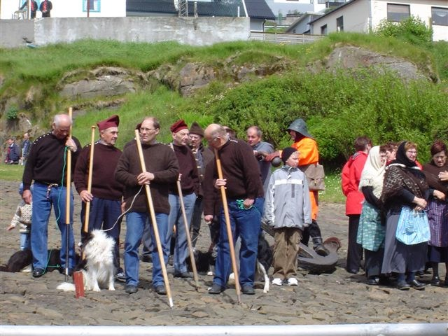 Färinger in der typischen Alltagskleidung mit dem braunen Schafswollpullover, dem sogenannten Fólkaflokstoyggja (scherzhaft für "Volksparteipullover" - die Anhänger von Fólkaflokkurin, der Volkspartei, tragen ihn angeblich besonders gerne).